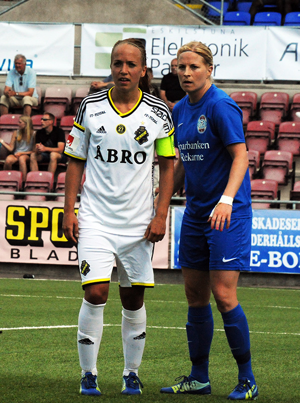 Malin Levenstad (AIK Fotboll Dam) v Annica Svensson (Eskilstuna United)